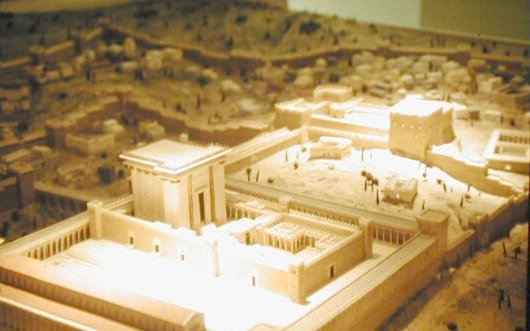 Modell des jüdischen Tempels in Jerusalem (Museumpark Orientalis, Berg en Dal, Niederlande)